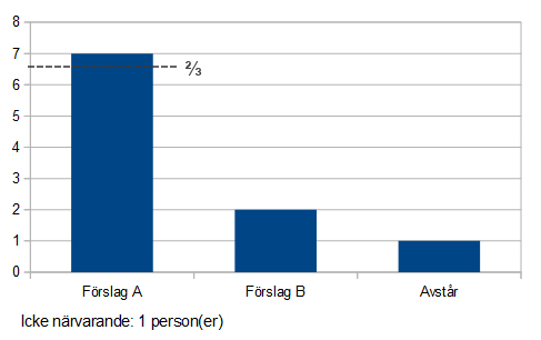 Skapad i Open Office 4.1.1